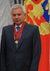 Орденом «За заслуги перед Отечеством» II степени награждён президент ОАО «Нефтяная компания «ЛУКОЙЛ» Вагит Алекперов